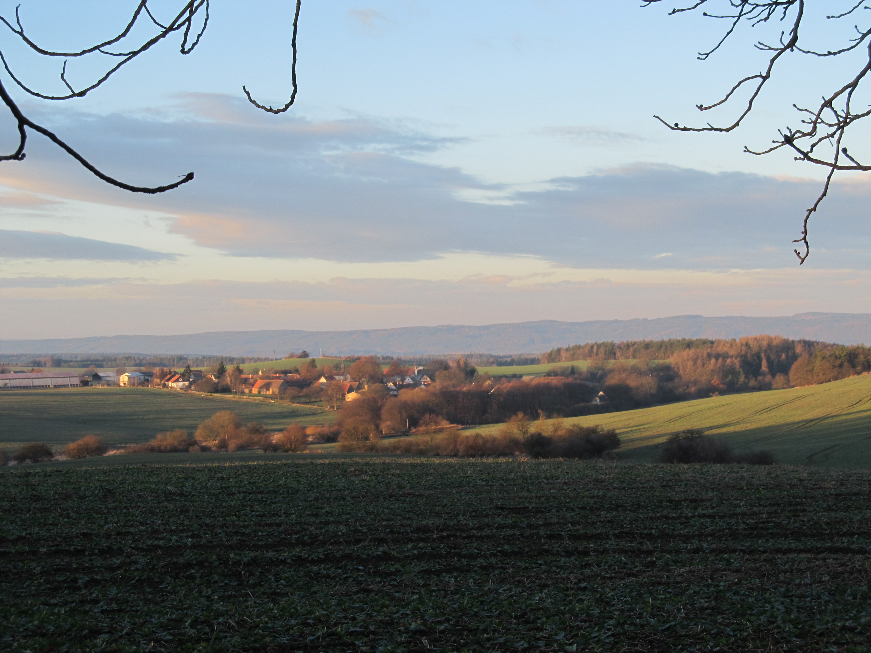 Drahouš a Doupovské hory z cesty k Plavečské kapli